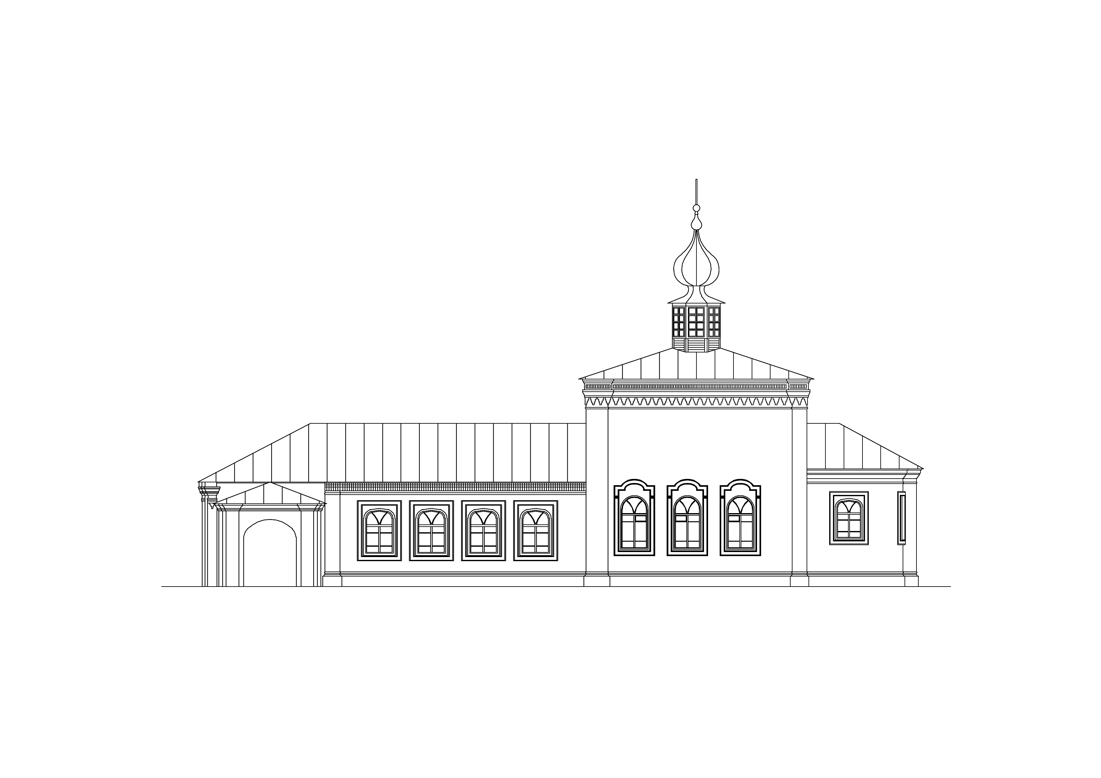 Архангельская церковь. Чертёж. Город Соликамск